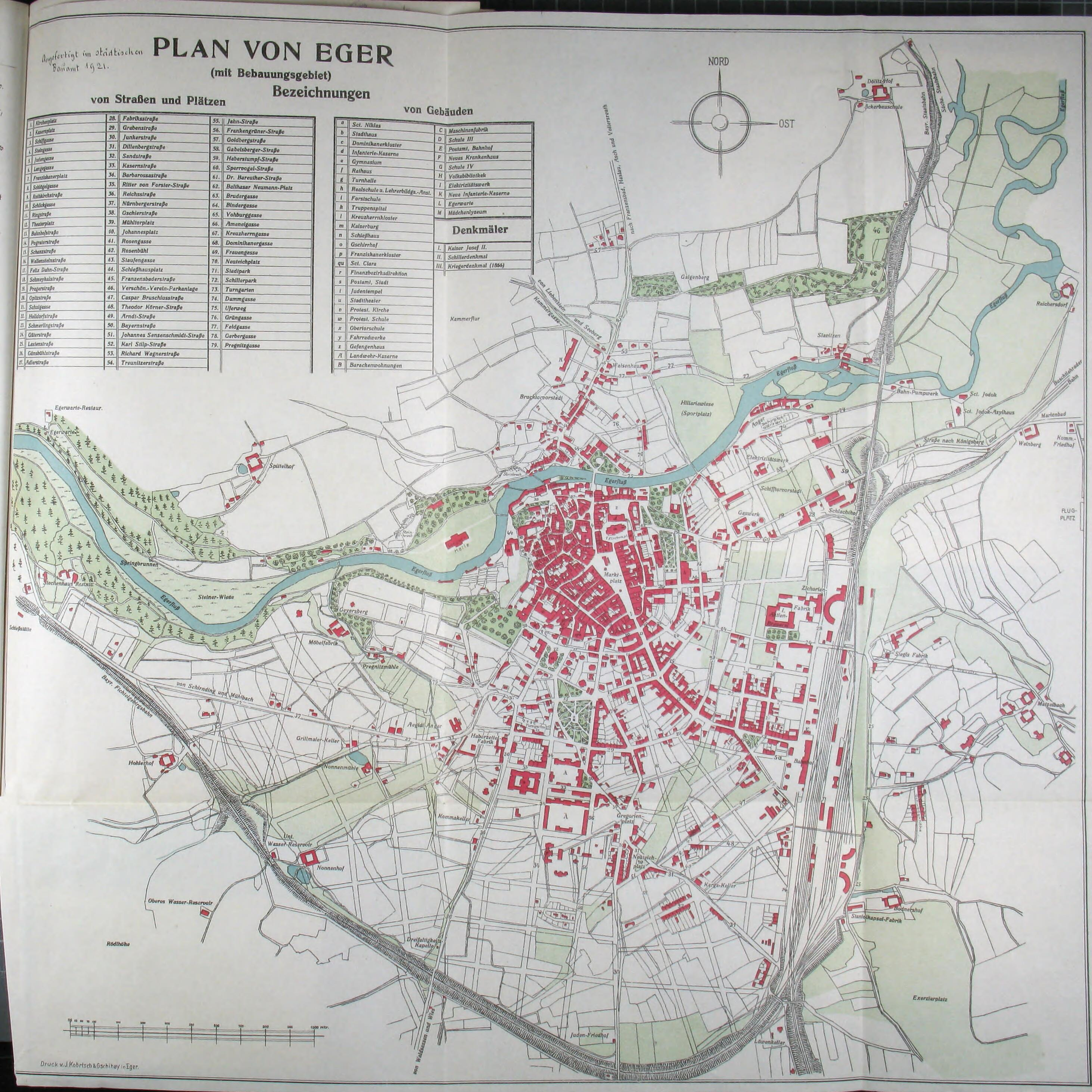 Stadtplan von Eger (Cheb), Böhmen, Tschechien